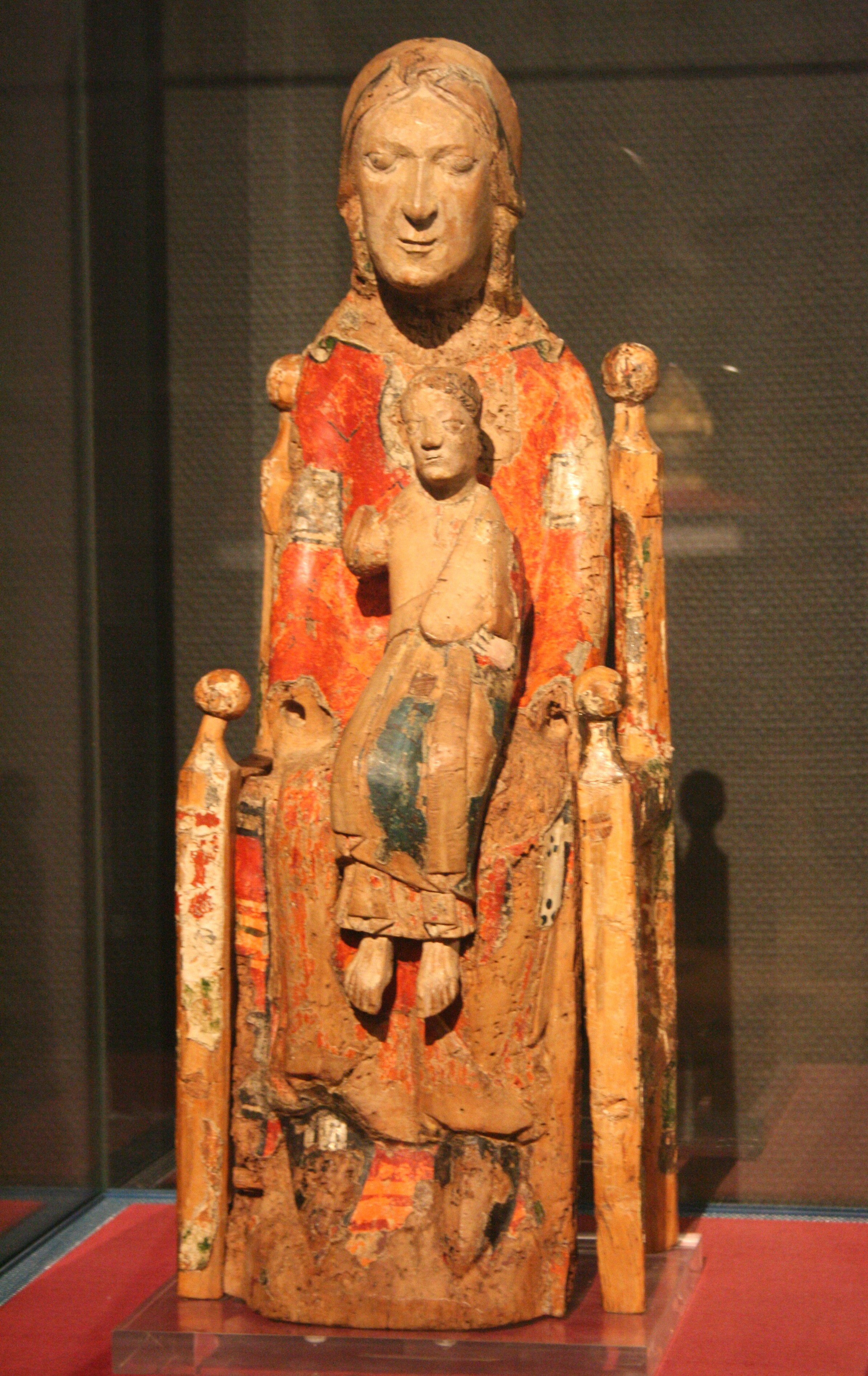 Vierge à l'enfant de type Sedes sapientiae. Atelier mosan du XIe siècle. Musée du Cinquantenaire, Bruxelles (Belgique)